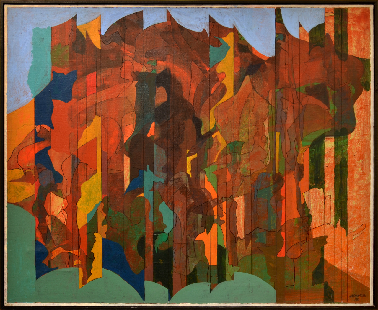 Jiří Mrázek, Les, akryl, plátno, 65x80 cm, 1981